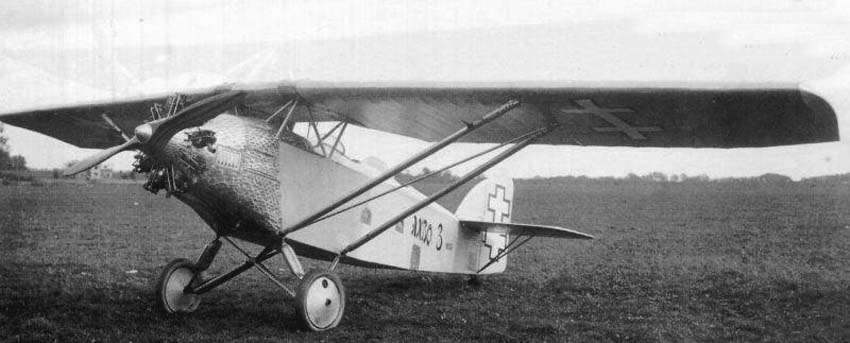 Litewski samolot szkolny ANBO-III.